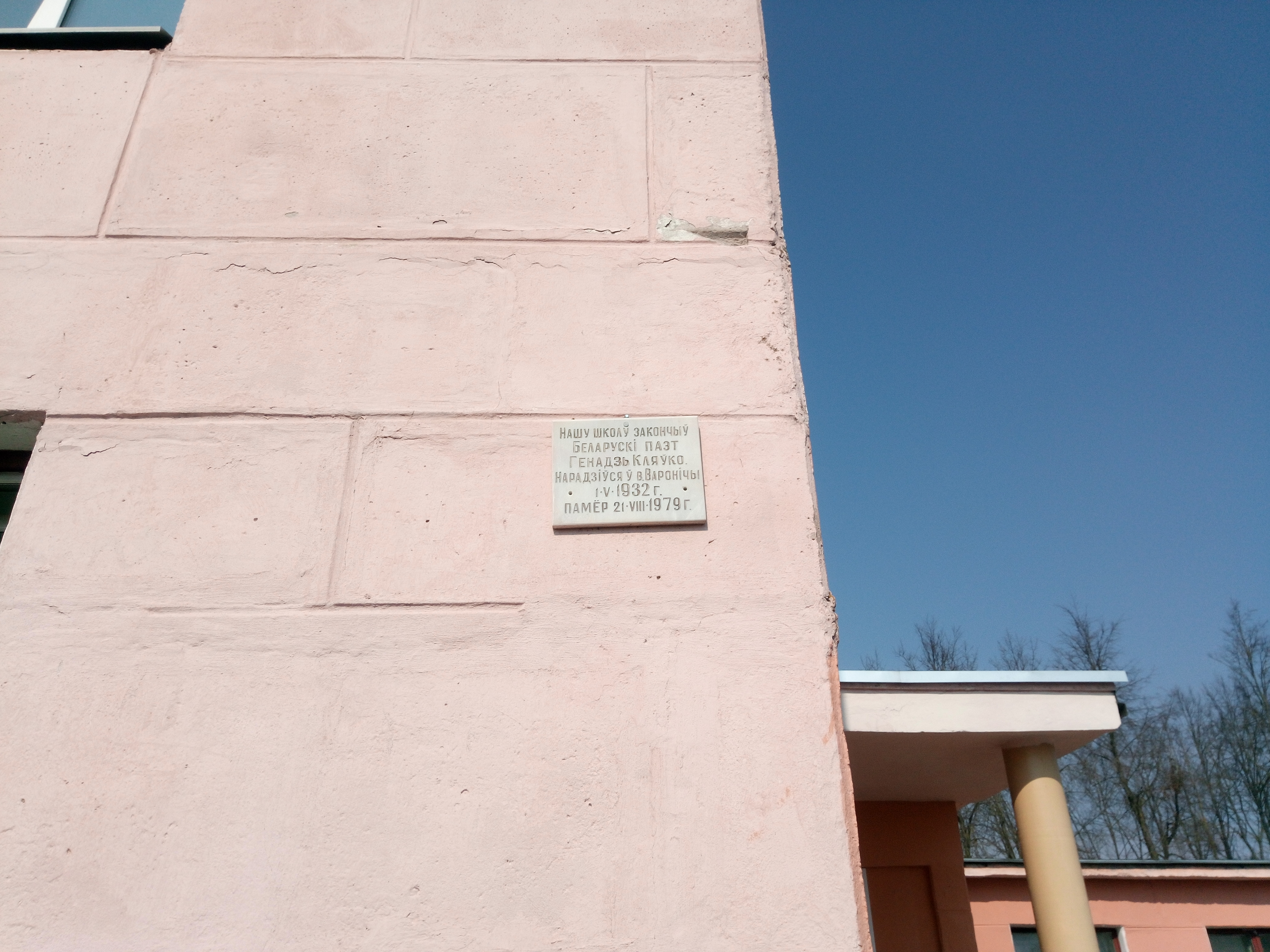 Памятная таблічка на Рудзенскай школе ў гонар беларускага паэта Генадзь Кляўко.